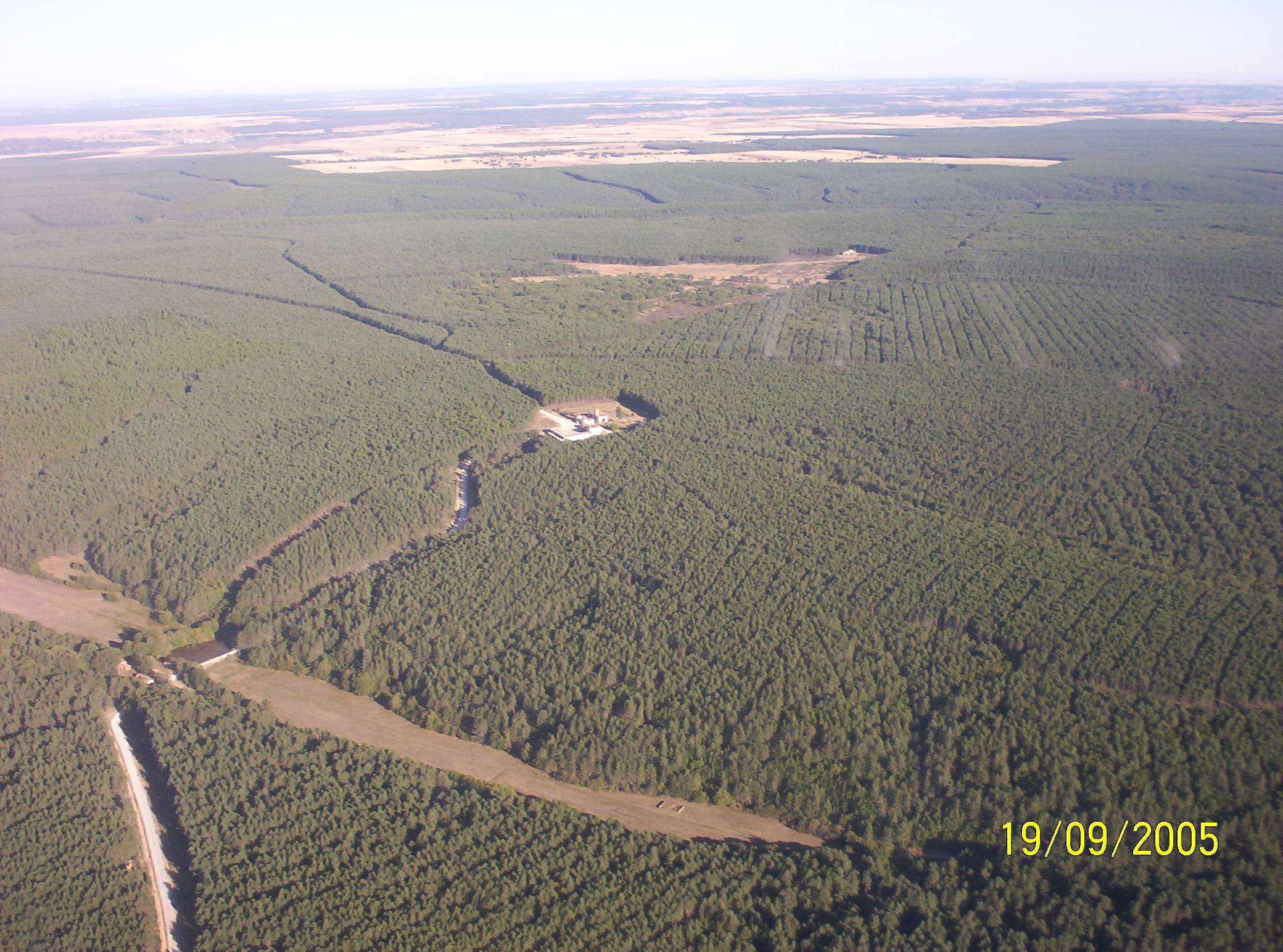 Vista parcial del monte de Riocamba, en León, España, y sus alrededores, en un viaje a un incencio en la provincia de Palencia.